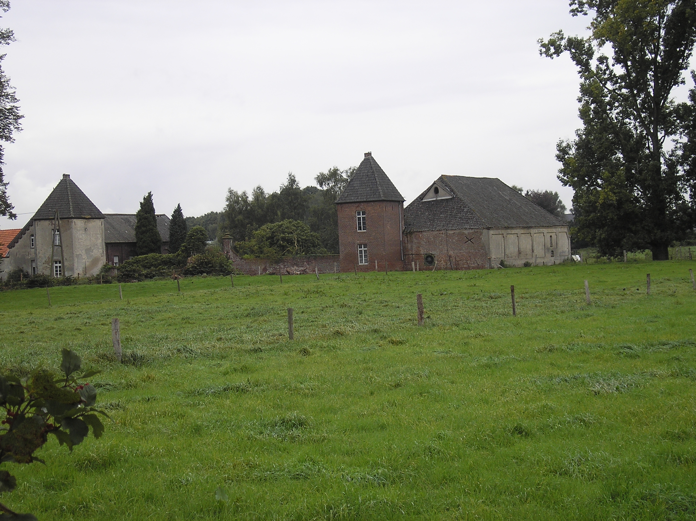 Haus Driesberg bei Kessel, Stadt Goch